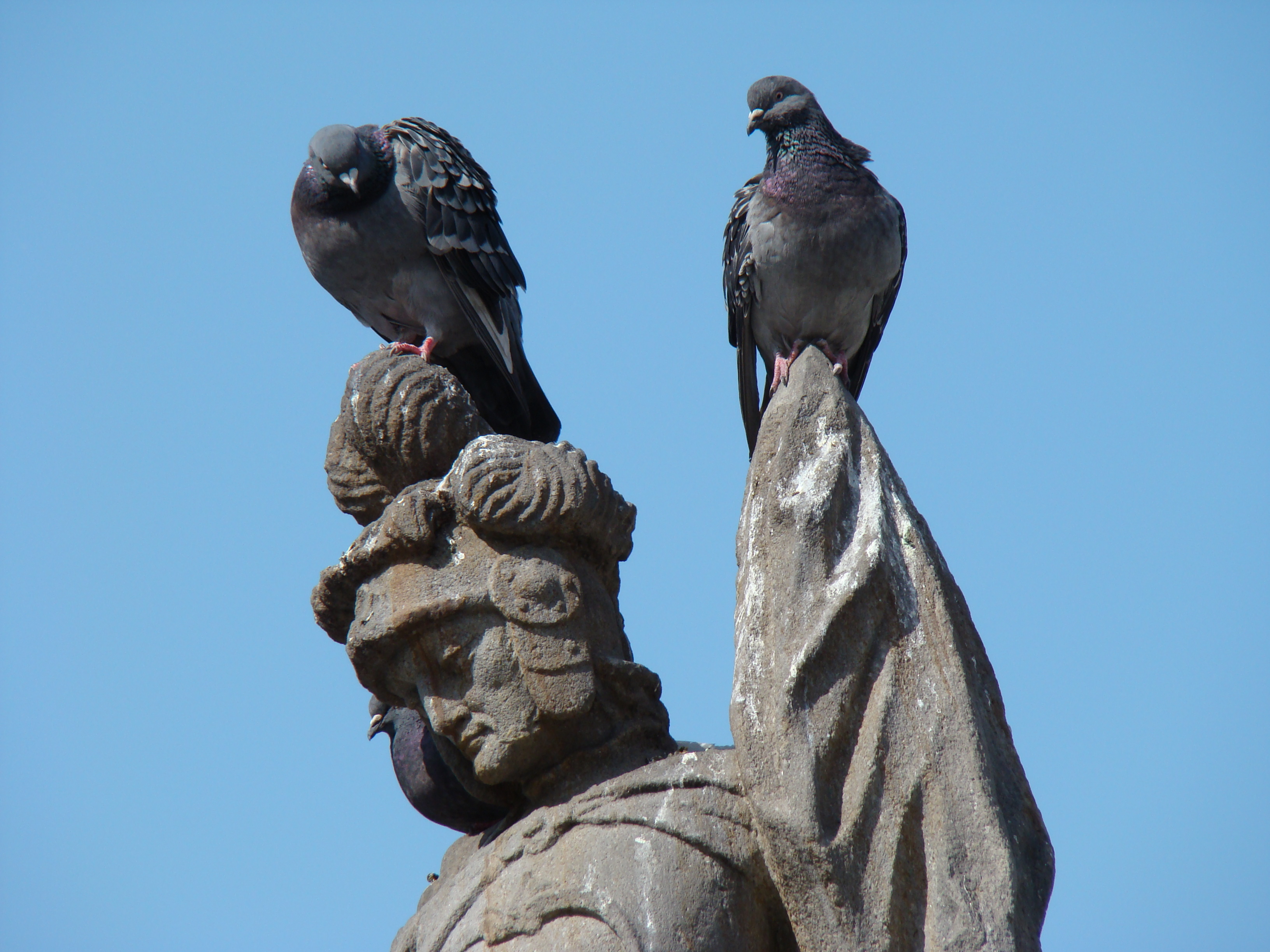 Św. Florian na rynku w Cieszynie